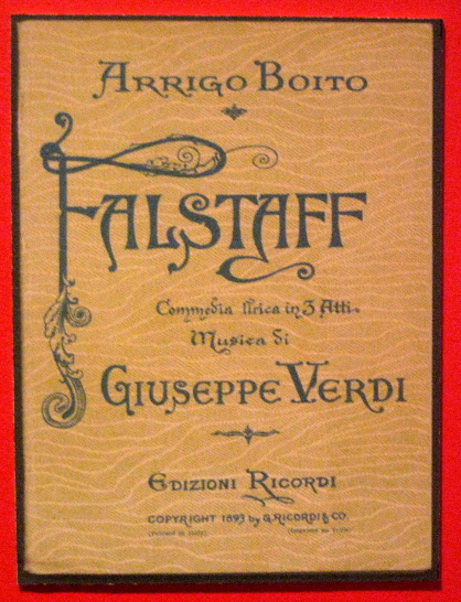 Boito-Verdi - Falstaff libretto